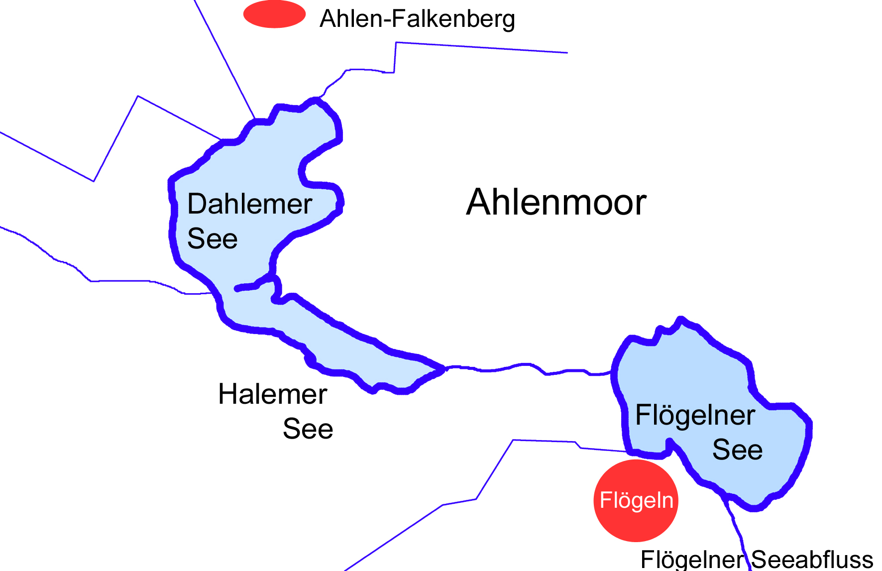 Dahlemer, Halemer und Flögelner See